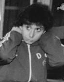 Sabine Brehm ADN-ZB Oberst 26.11.88 Berlin: Eisschnellauf-Im Rahmen des Eisschnellauf-Weltcups der Frauen verabschiedeten sich die bekannten Eisschnelläuferinnen Andrea Ehrig, Gabi Zange, Karin Kania und Sabine Brehm (vlnr) vom aktiven Sport.